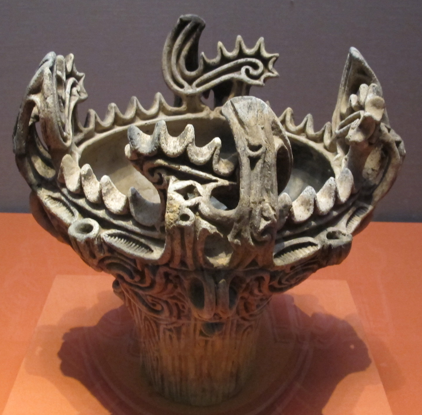 Periodo jomon, vaso con decorazione fiammeggiante, 3000-2000 a.c.